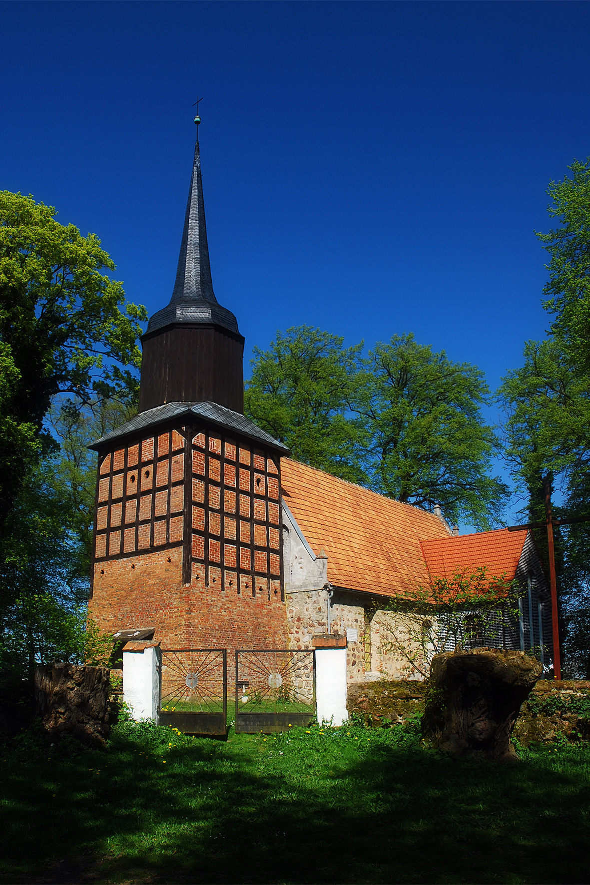 Rybokarty kościół fil. p.w. św. Józefa (zabytek nr rejestr. 186)